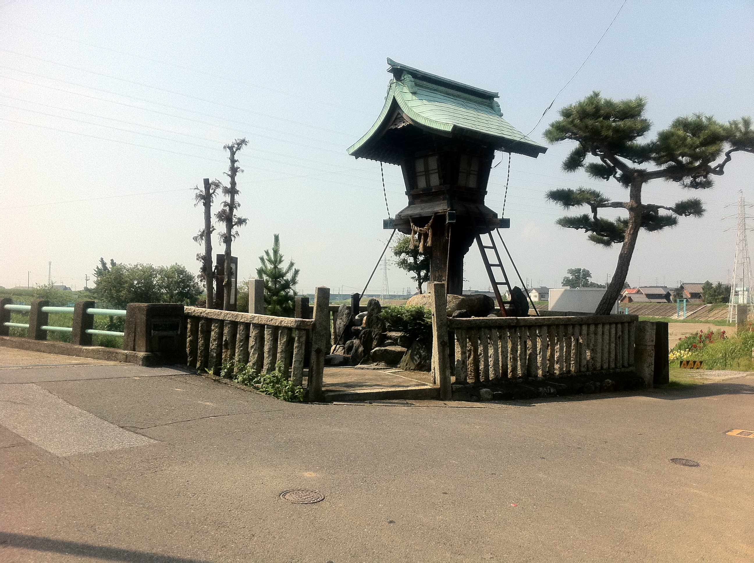 杭瀬川塩田橋の常夜灯